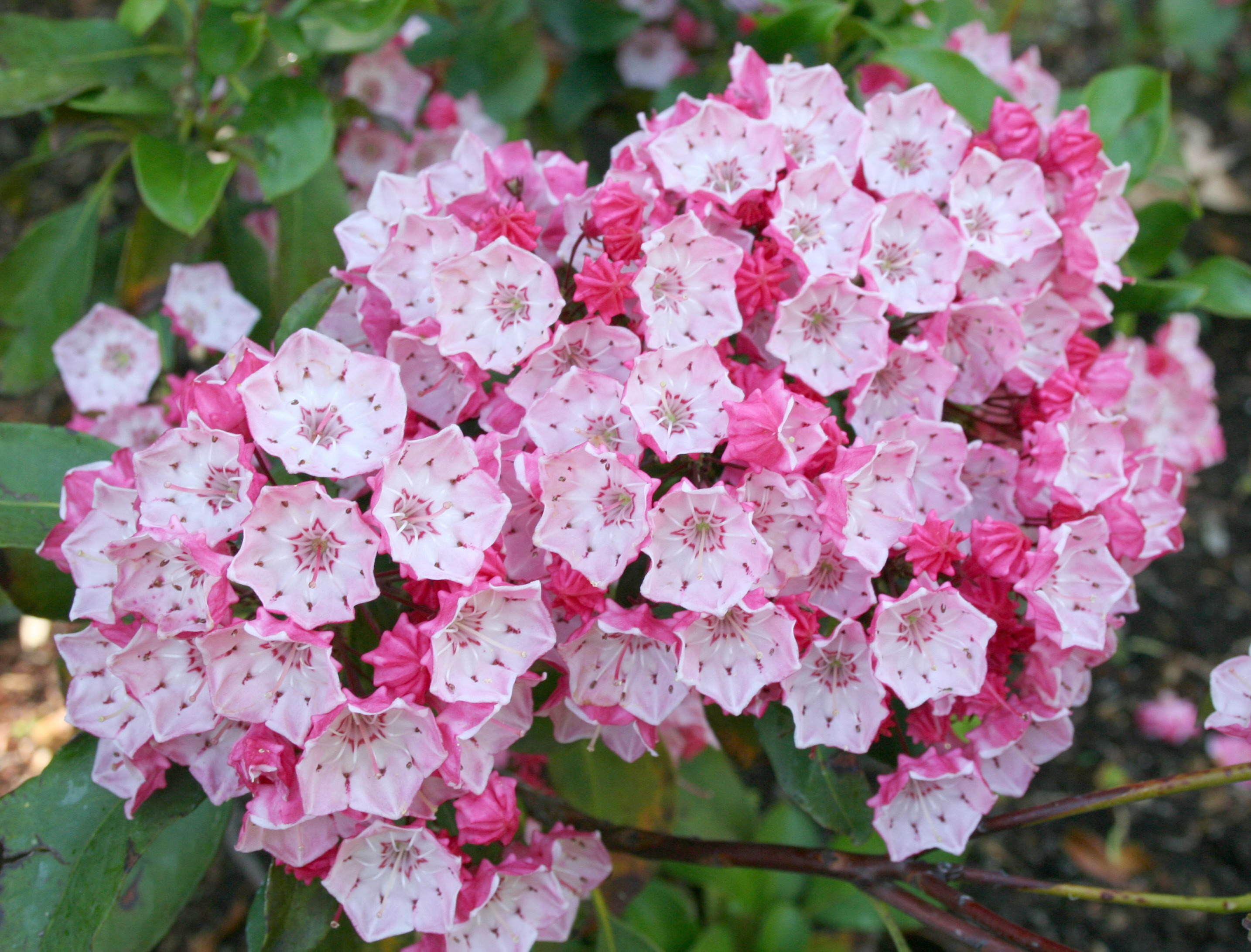 Kalmia latifolia 'Clementine Churchill'. Real Jardín Botánico, Madrid.